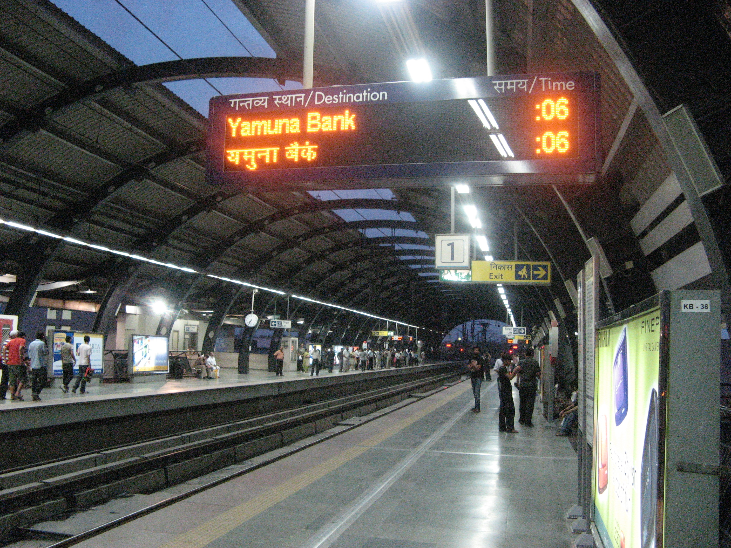 Delhi Metro station signal